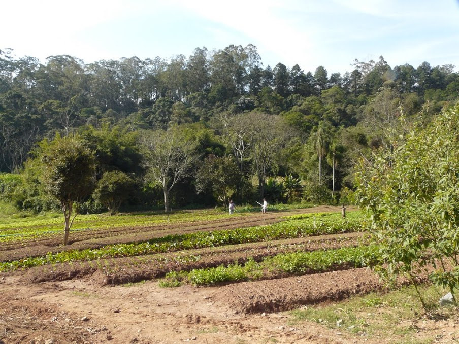 Der Demeter-Gemüsegarten in Horizonte Azul, von dem aus die beteiligten Favelas der Associação Comunitária Monte Azul versorgt werden.